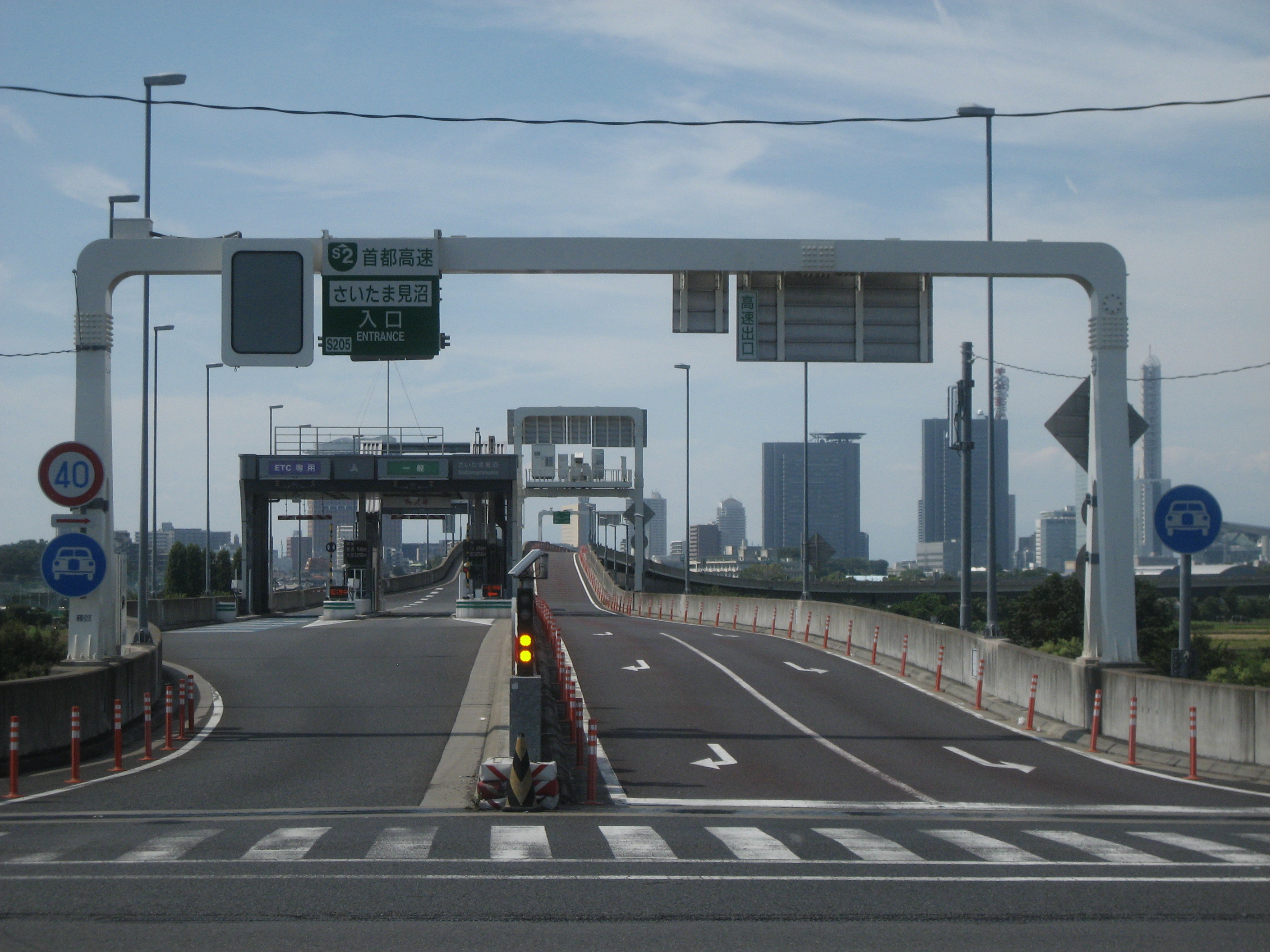 首都高速道路さいたま新都心線さいたま見沼出入口（接続する県道から撮影）